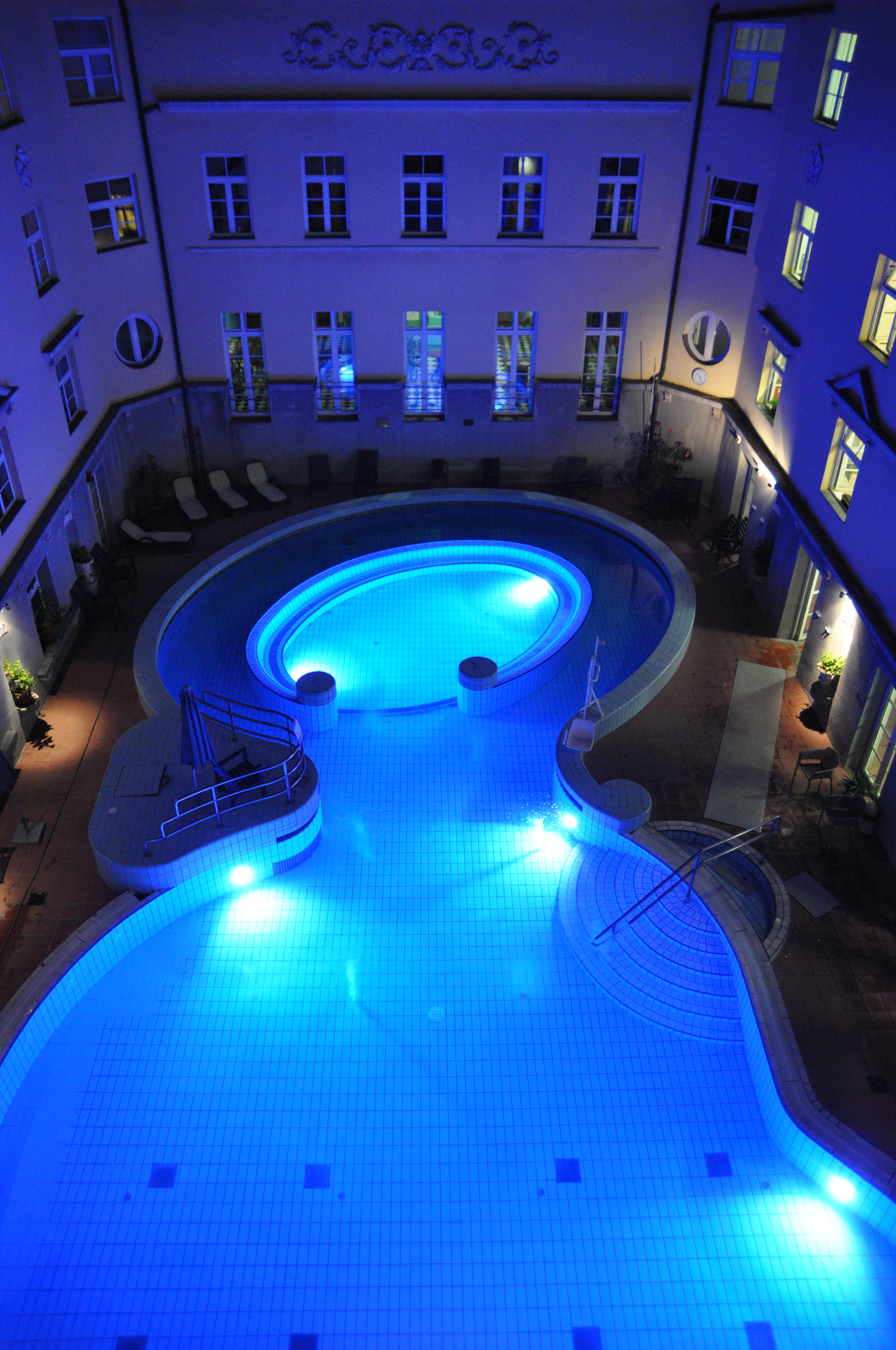 Budapest, Lukács fürdő, élménymedence